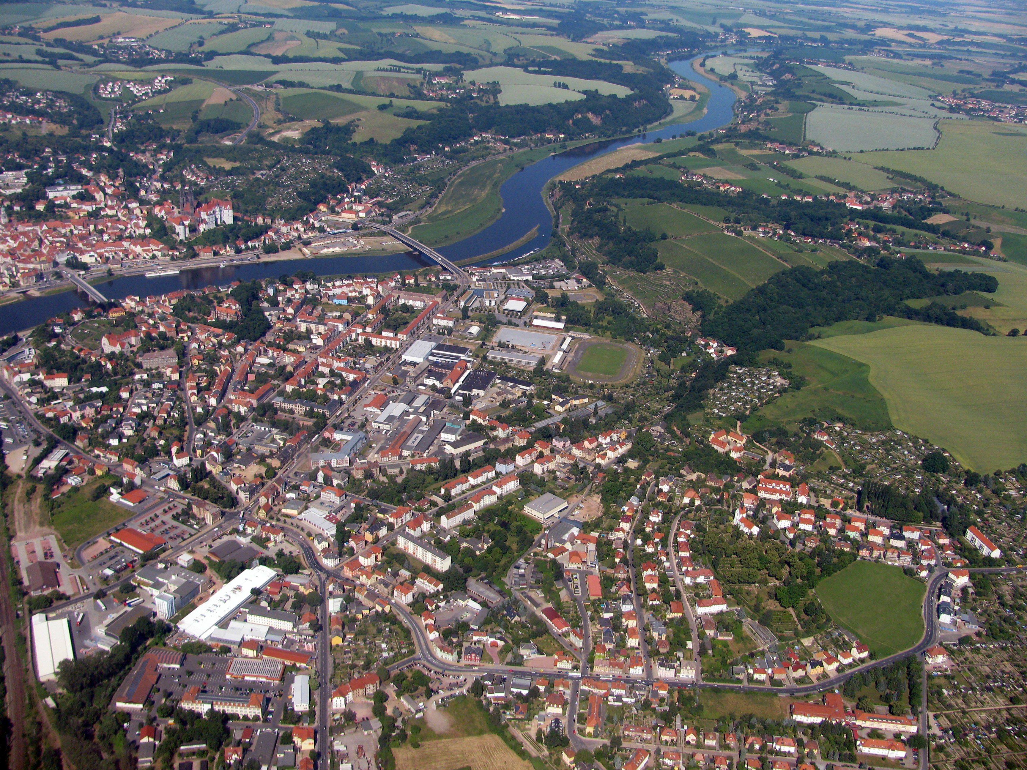 Luftbild Meißen-Zscheila